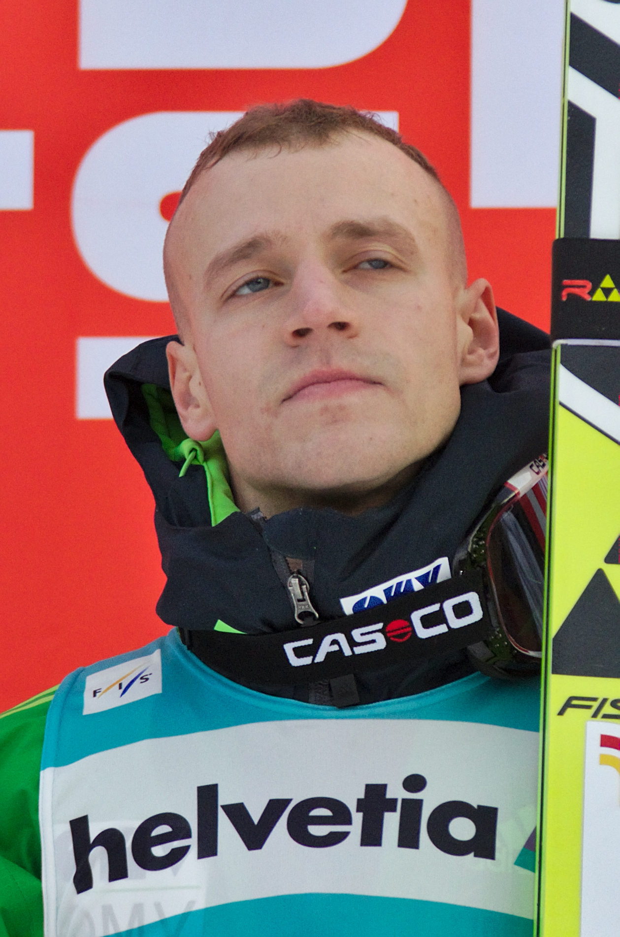 FIS Ski Jumping World Cup 2014 - Engelberg - 20141221 - Roman Koudelka